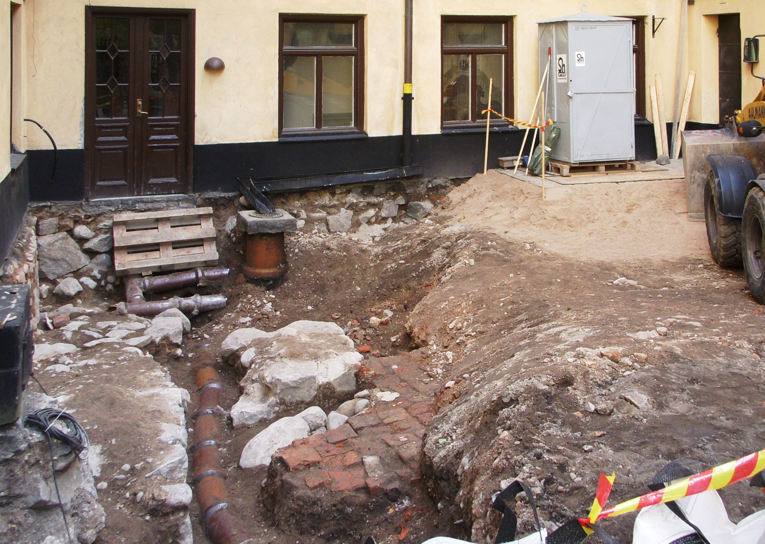 Ett framgrävt tegelgolv i kvarteret Venus i Gamla stan. Golvet visade sig att ha legat inne i Dominikanerklostret som fanns på platsen fram till ca. år 1540.